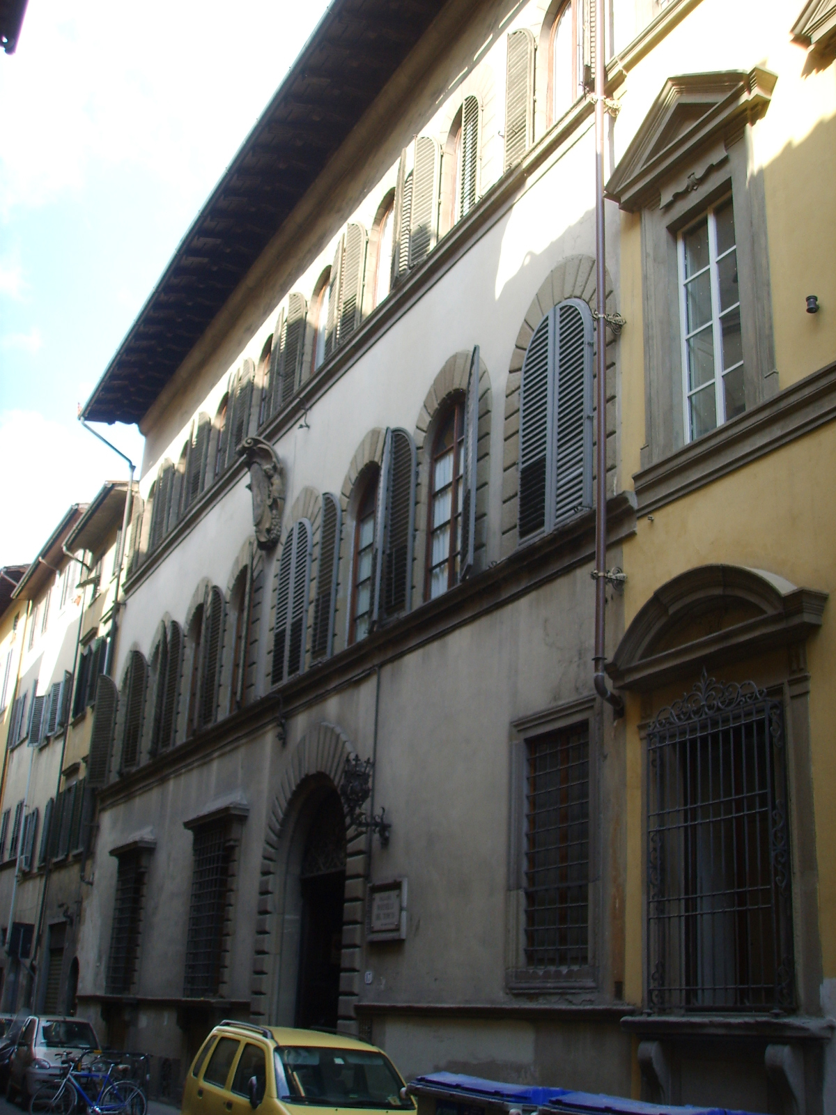 Palazzo rosselli del turco, esterno